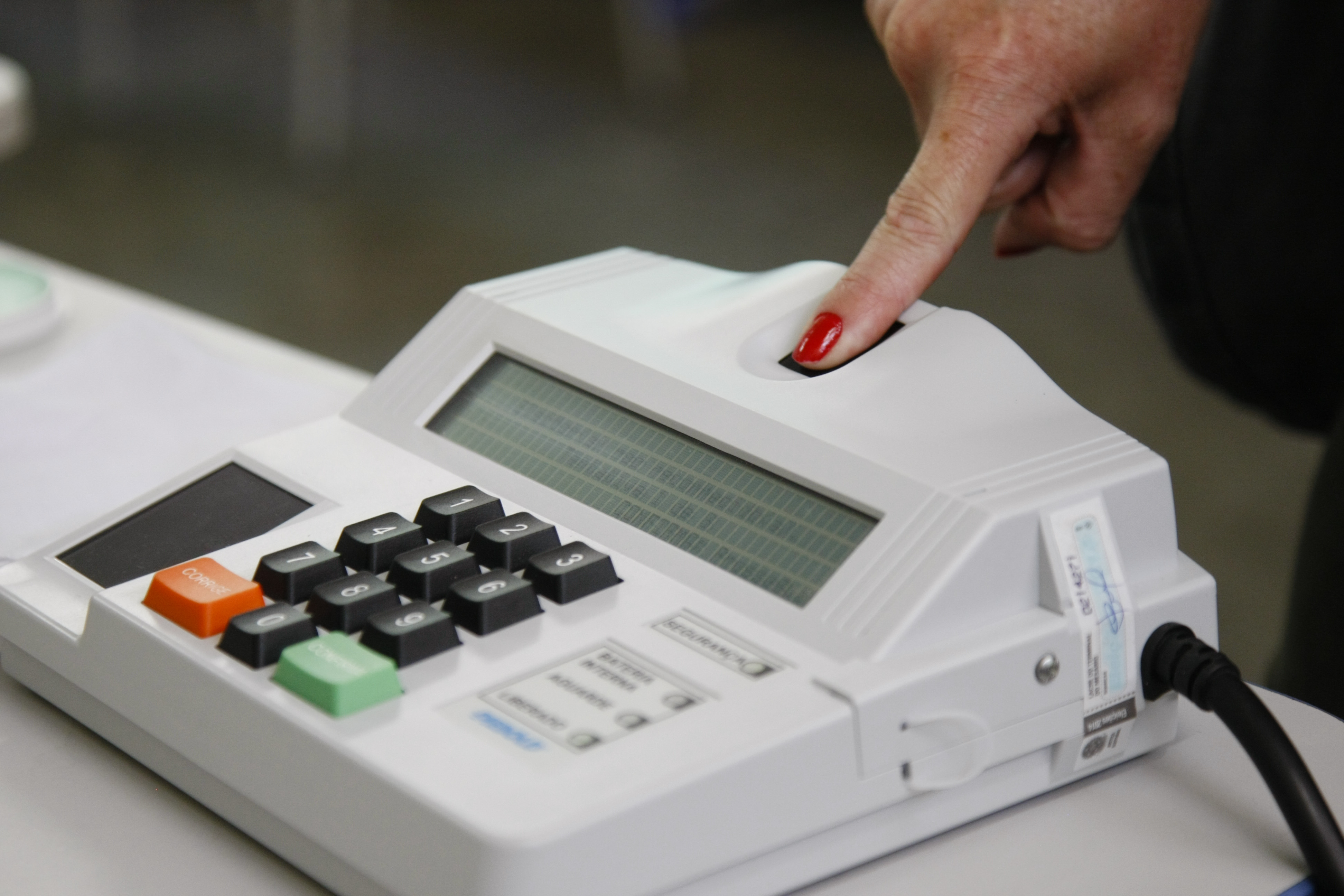 Eleições 2014 - Votação no primeiro turno das eleições no Colégio Dom Orione, no Lago Sul, em Brasília. Foto: Marri Nogueira/Agência Senado